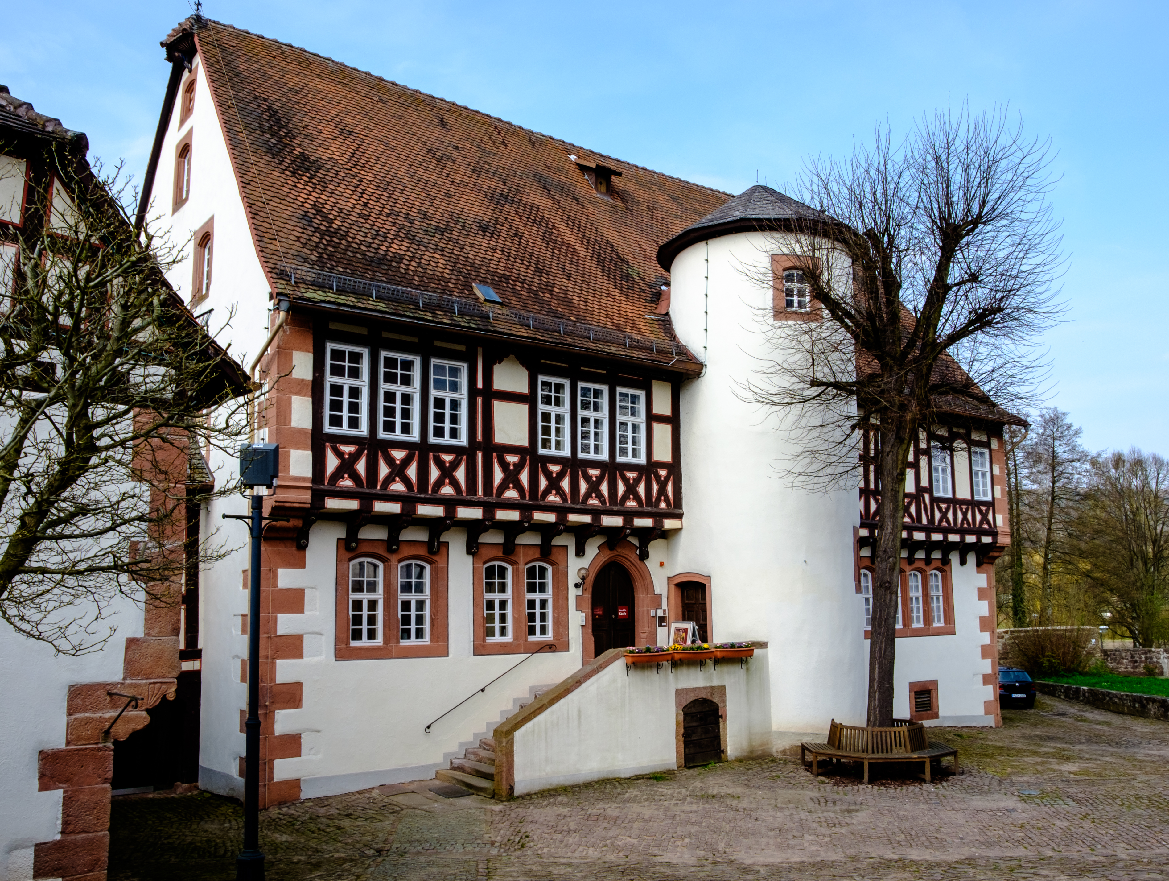 Brüder-Grimm-Haus in Steinau